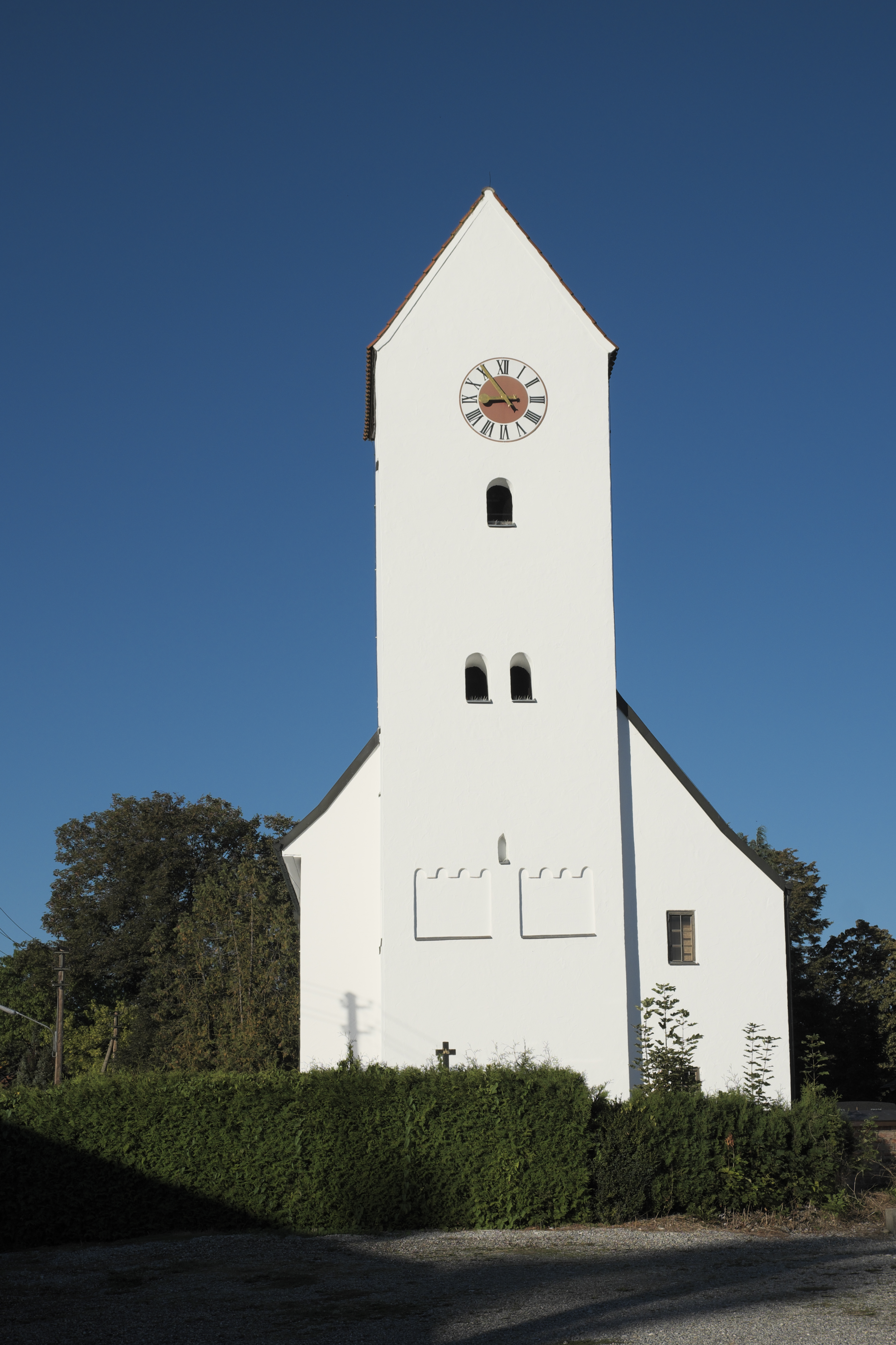 Katholische Filialkirche St. Stephanus in Esting (Olching) im Landkreis Fürstenfeldbruck (Bayern/Deutschland)